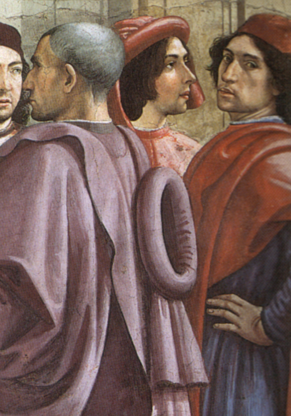 Autoritratto del ghirlandaio 2 (a destra) cappella sassetti